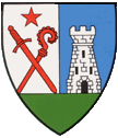 Wappen von Les Agettes